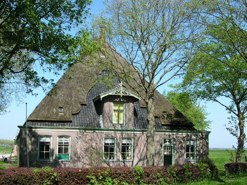 De stolpboerderij Zorg en Hoop in Sijbekarspel., gebouwd in 1874. The farm Zorg en Hoop in the village of Sijbekarspel. Bild in 1874.